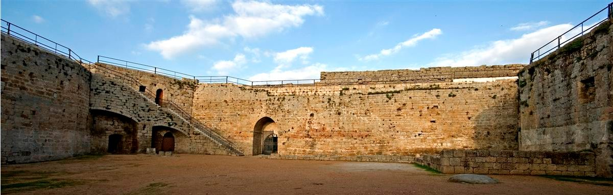 Panorámica del interior del castillo de Ledesma (Salamanca) después de Su Restauración